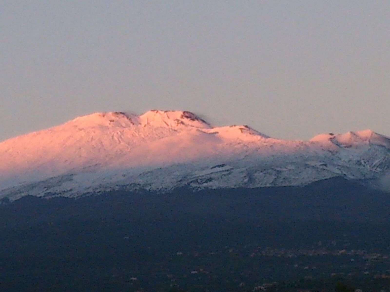 Immagine del complesso craterico sommitale dell'Etna.